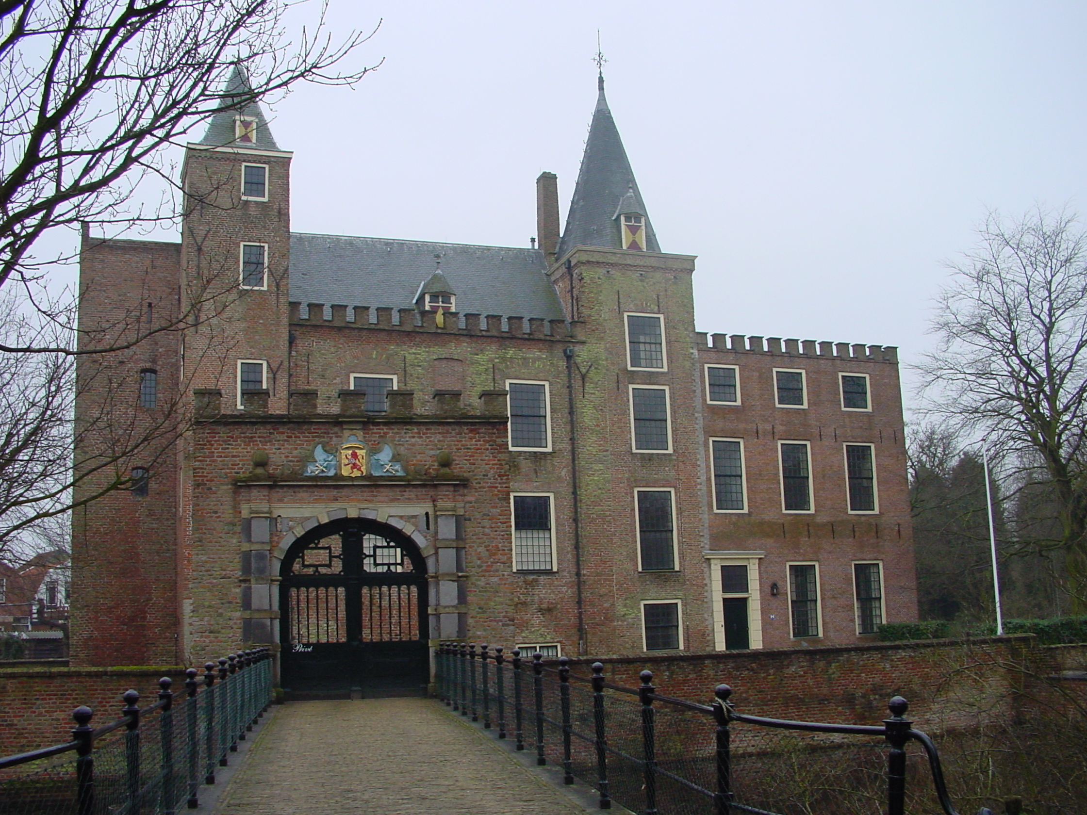 Slot Haamstede te Haamstede